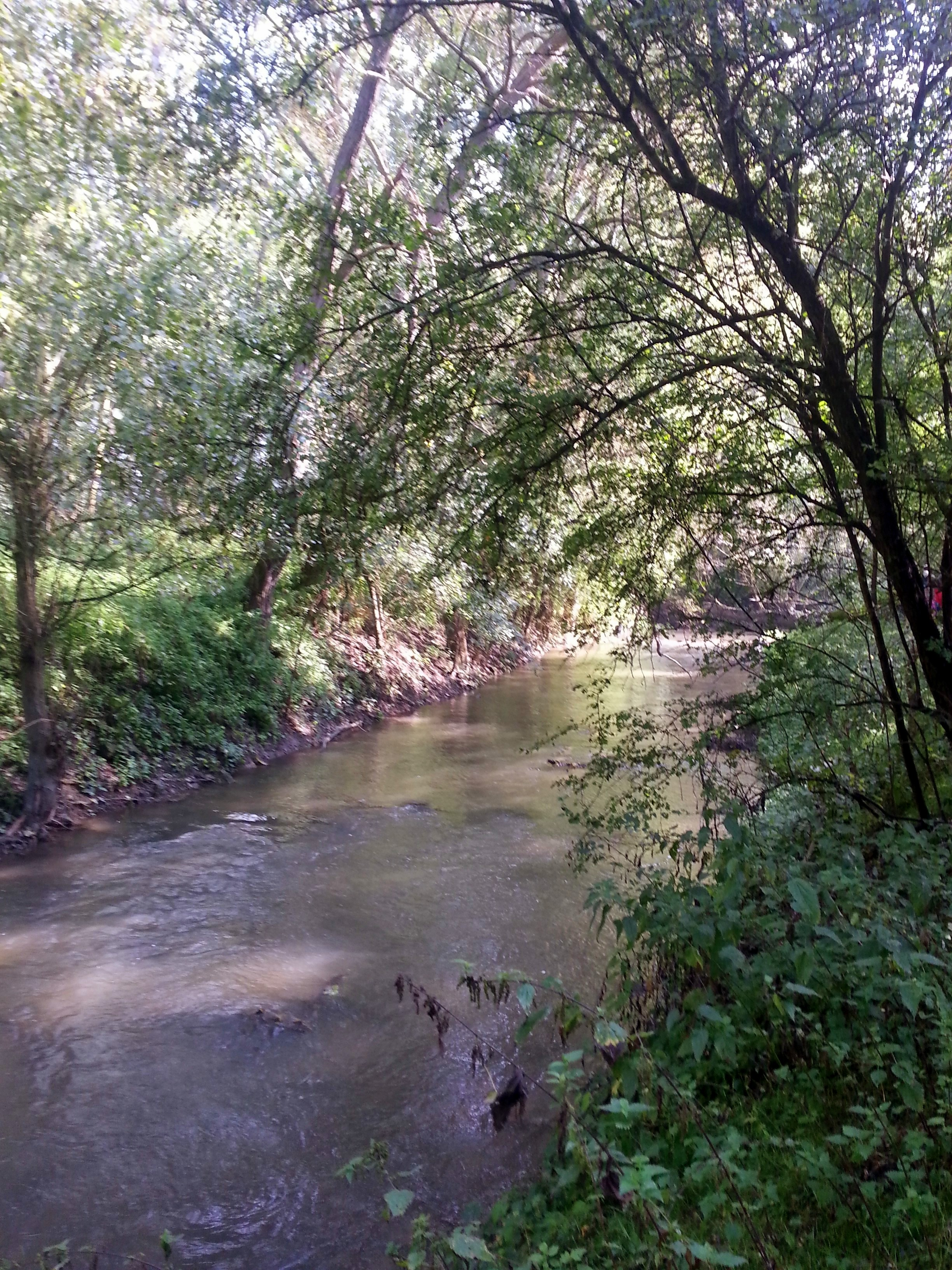 La Veude est un affluent de la Vienne. Cette photo a été prise à hauteur de Rivière (37500)